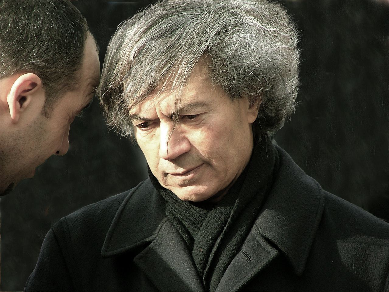 Foto van Mohamed Rabbae is gemaakt tijdens een kleine protest bijeenkomst van palestijnen voor het Binnenhof DenHaag